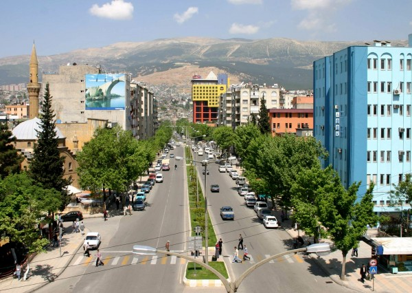 Kahramanmaraş town center